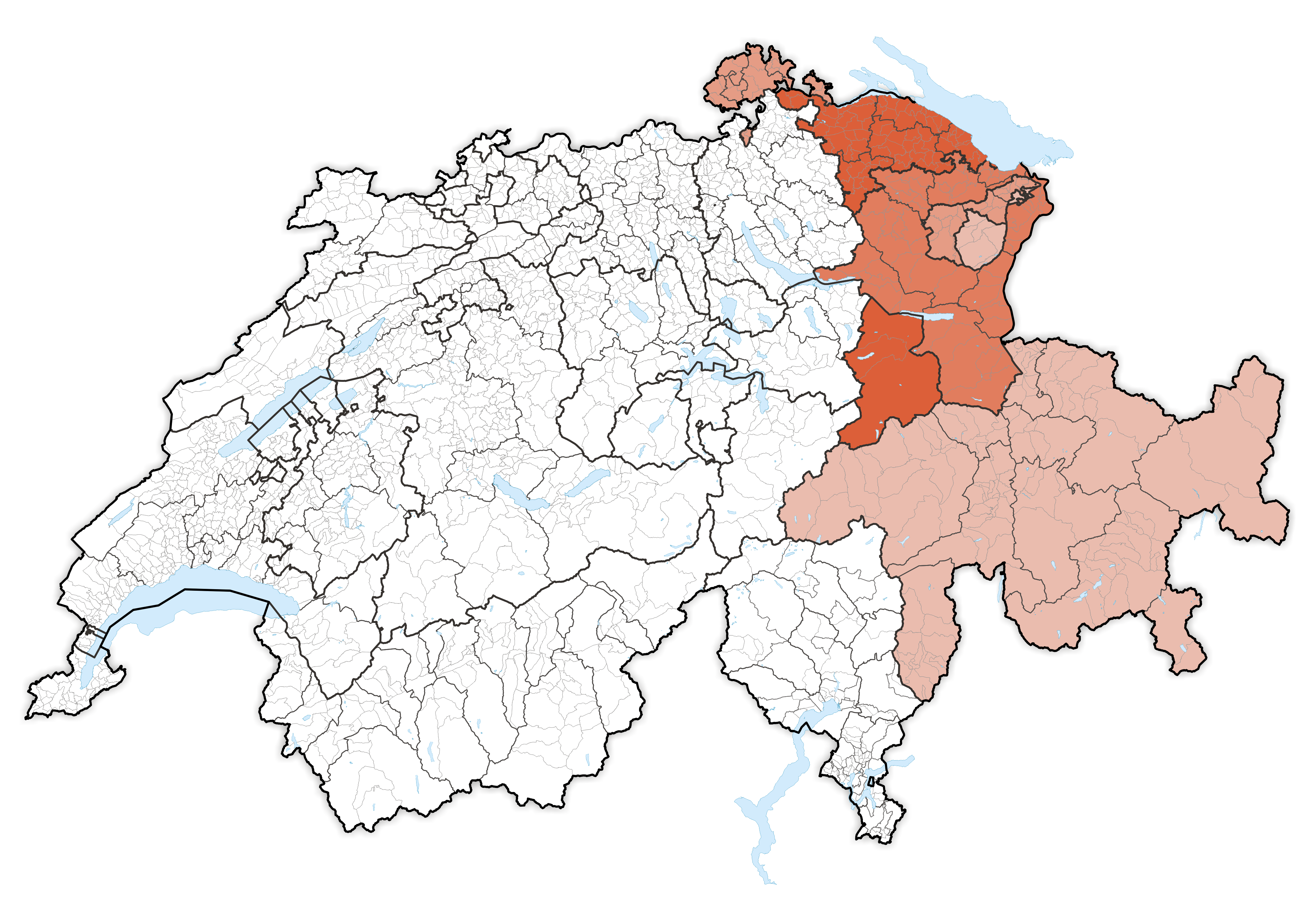 Ostschweiz